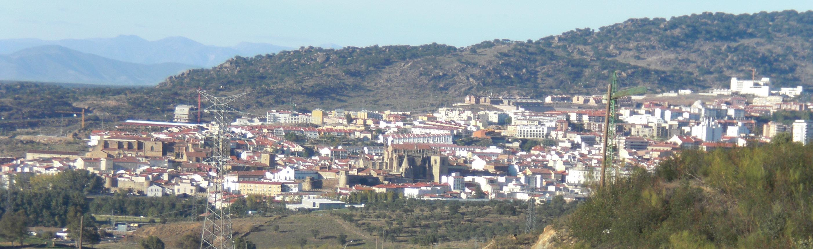 panoramo de la loĝloko Plasencio